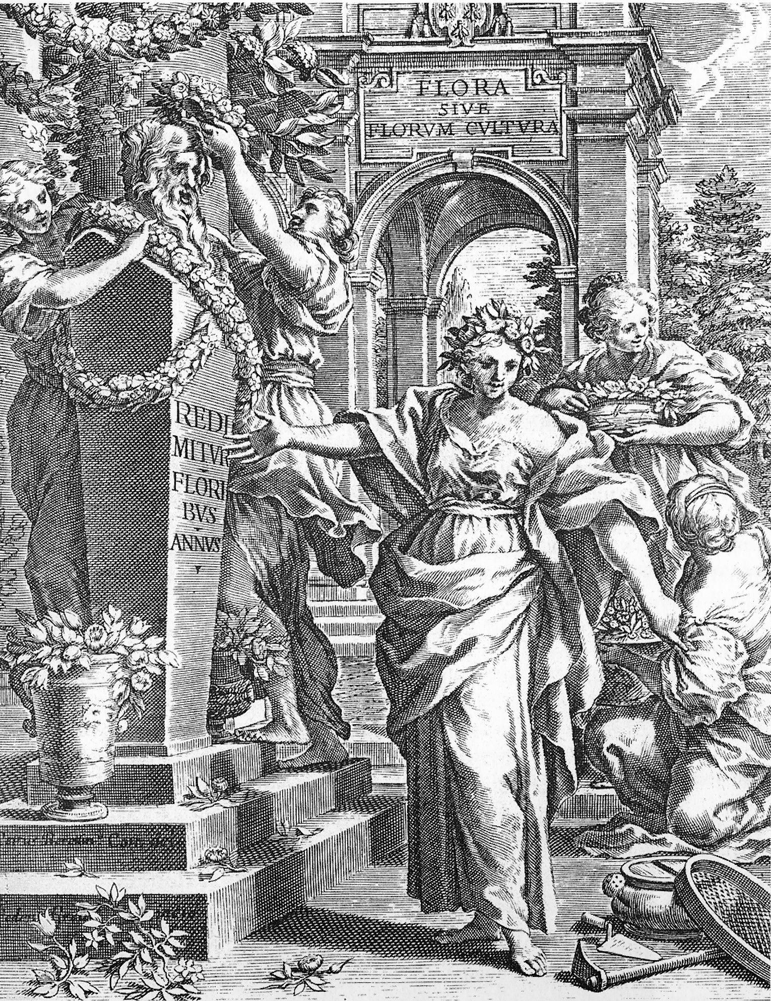 Scansione dall'incisione nel frontespizio del volume Flora ouero Cultura di fiori del p. Gio. Battista Ferrari senese della Comp. di Giesu distinta in quattro libri e trasportata dalla lingua latina nell'italiana da Lodouico Aureli, in Roma: per Pier'Antonio Facciotti, 1638